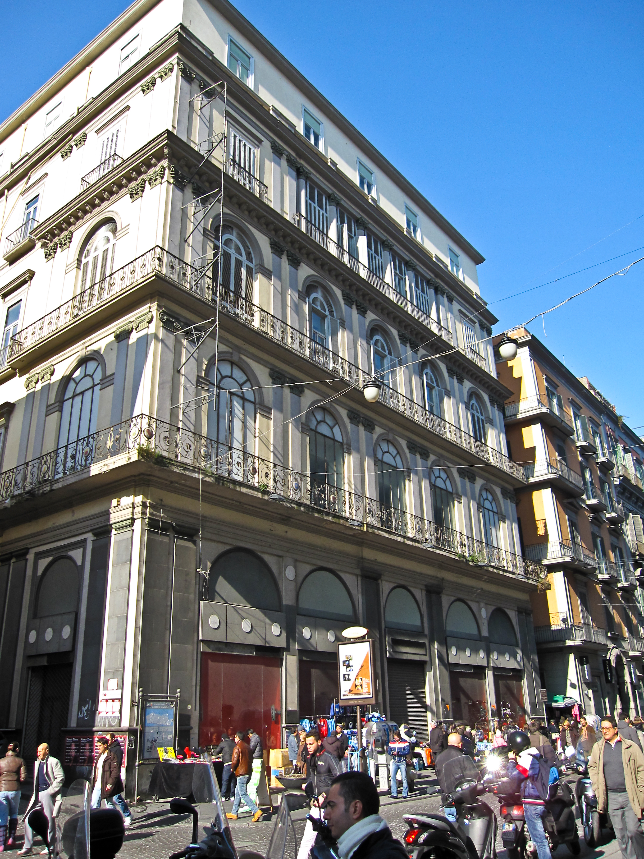 Napoli - Palazzo Buono. La facciata su Via Toledo